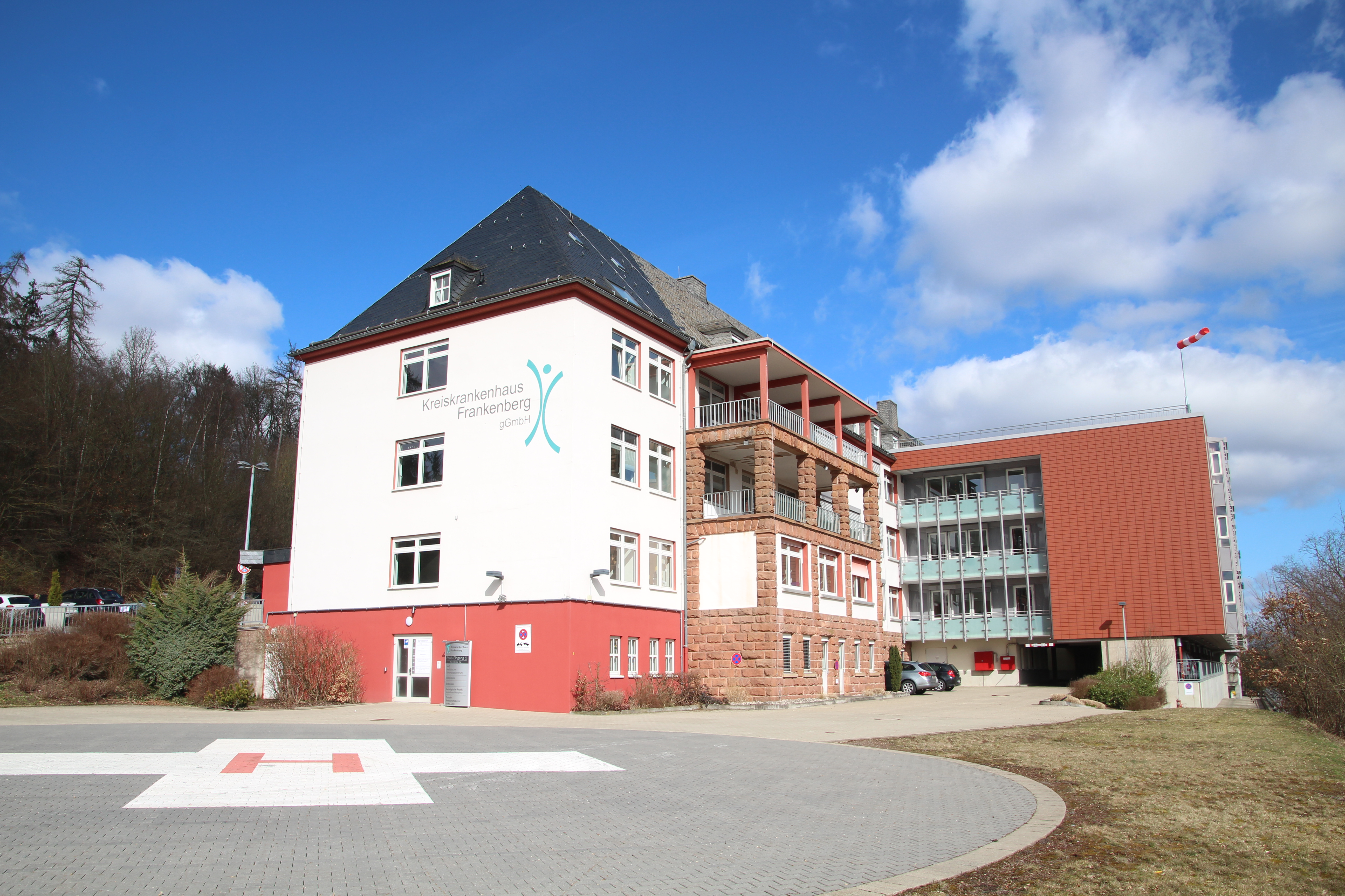 Siehe Bild und Dateiname